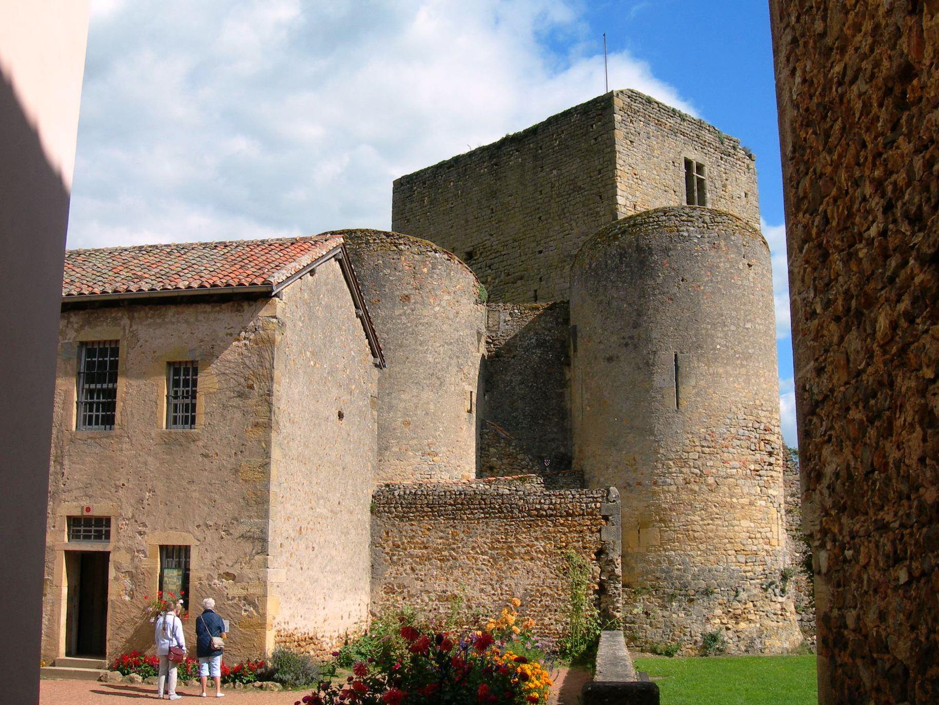 Semur-en-Brionais (F), castle.